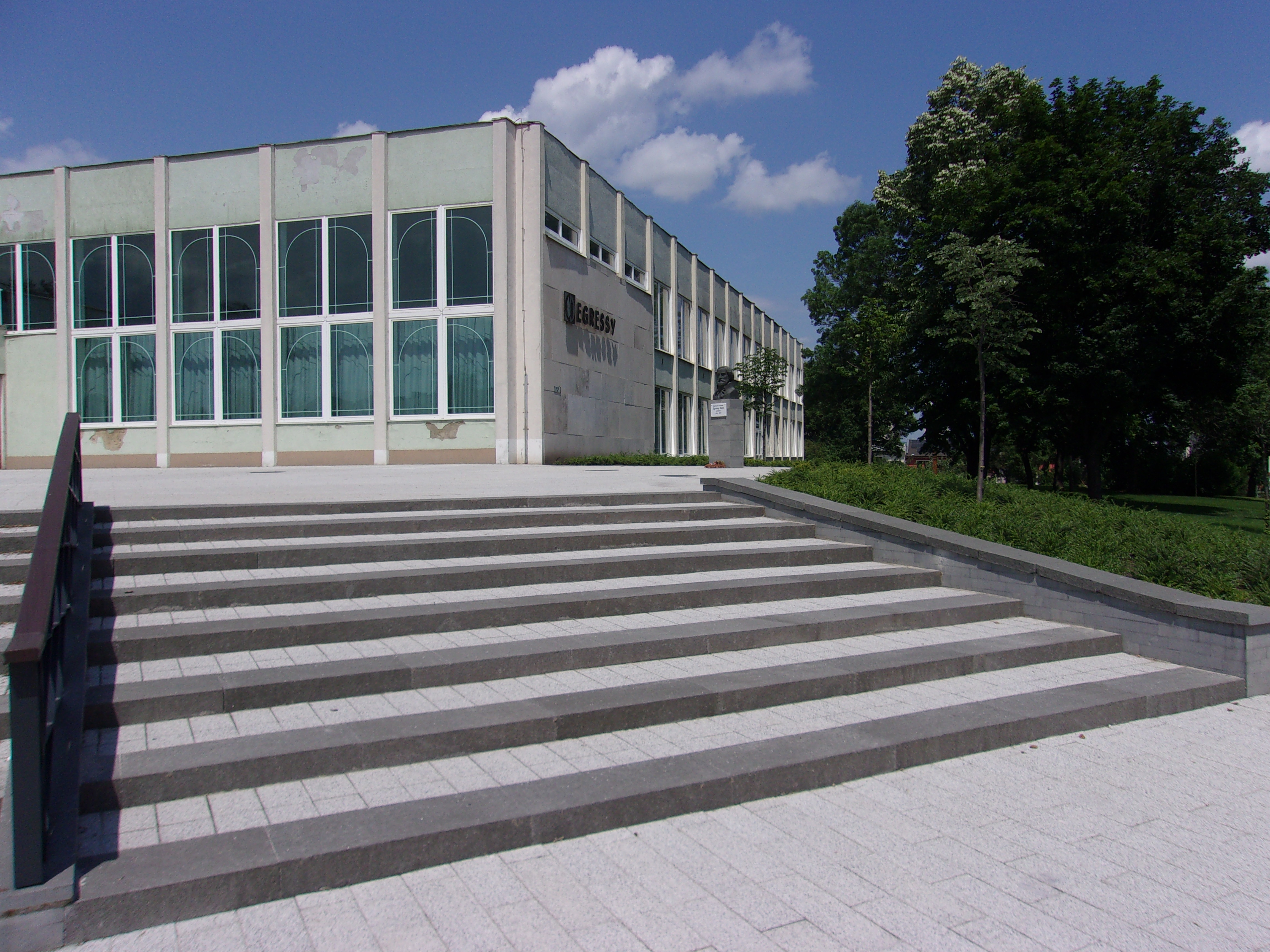 Kazincbarcika, Fő tér